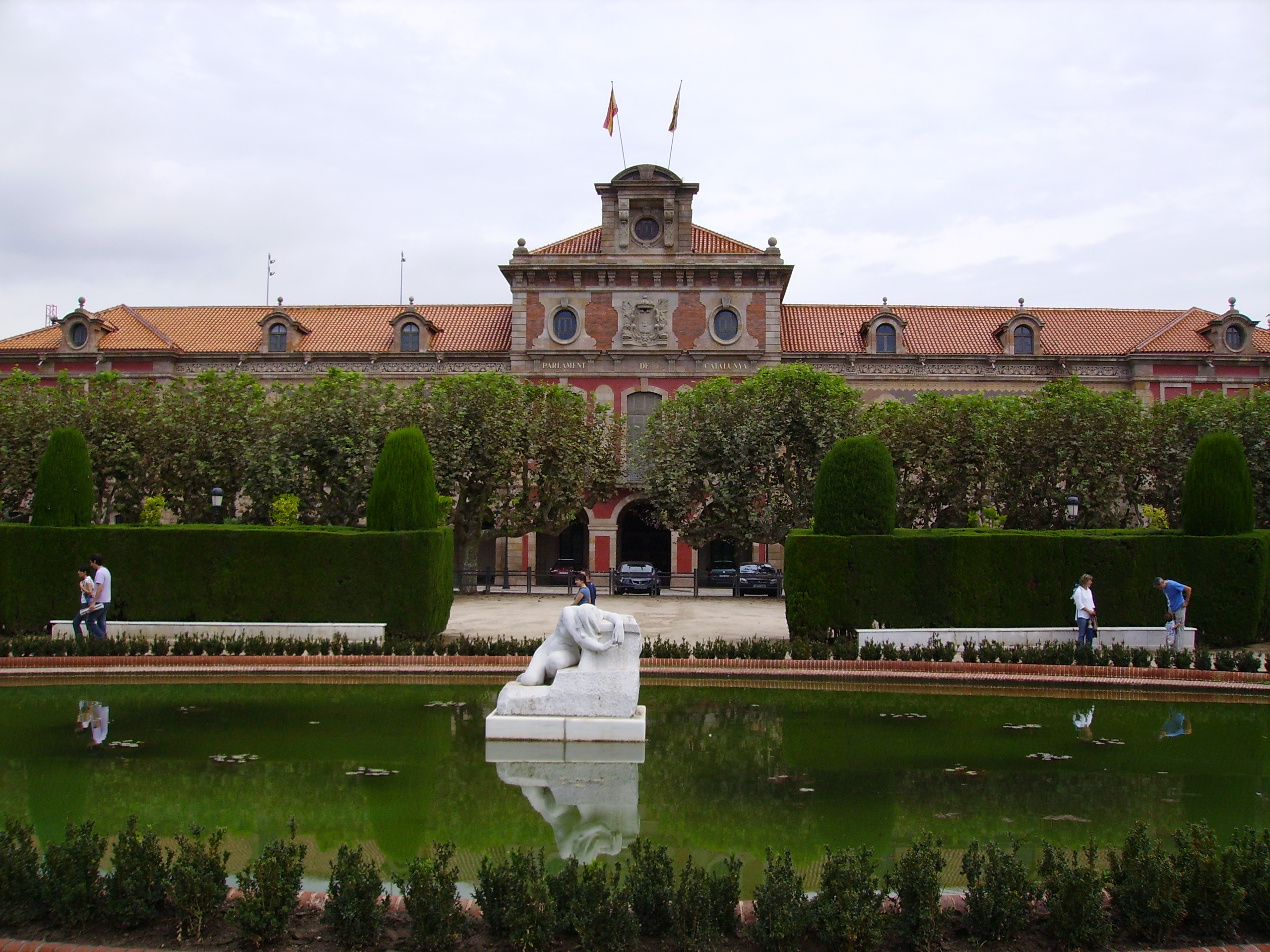 Vista exterior del Parlament de Catalunya.